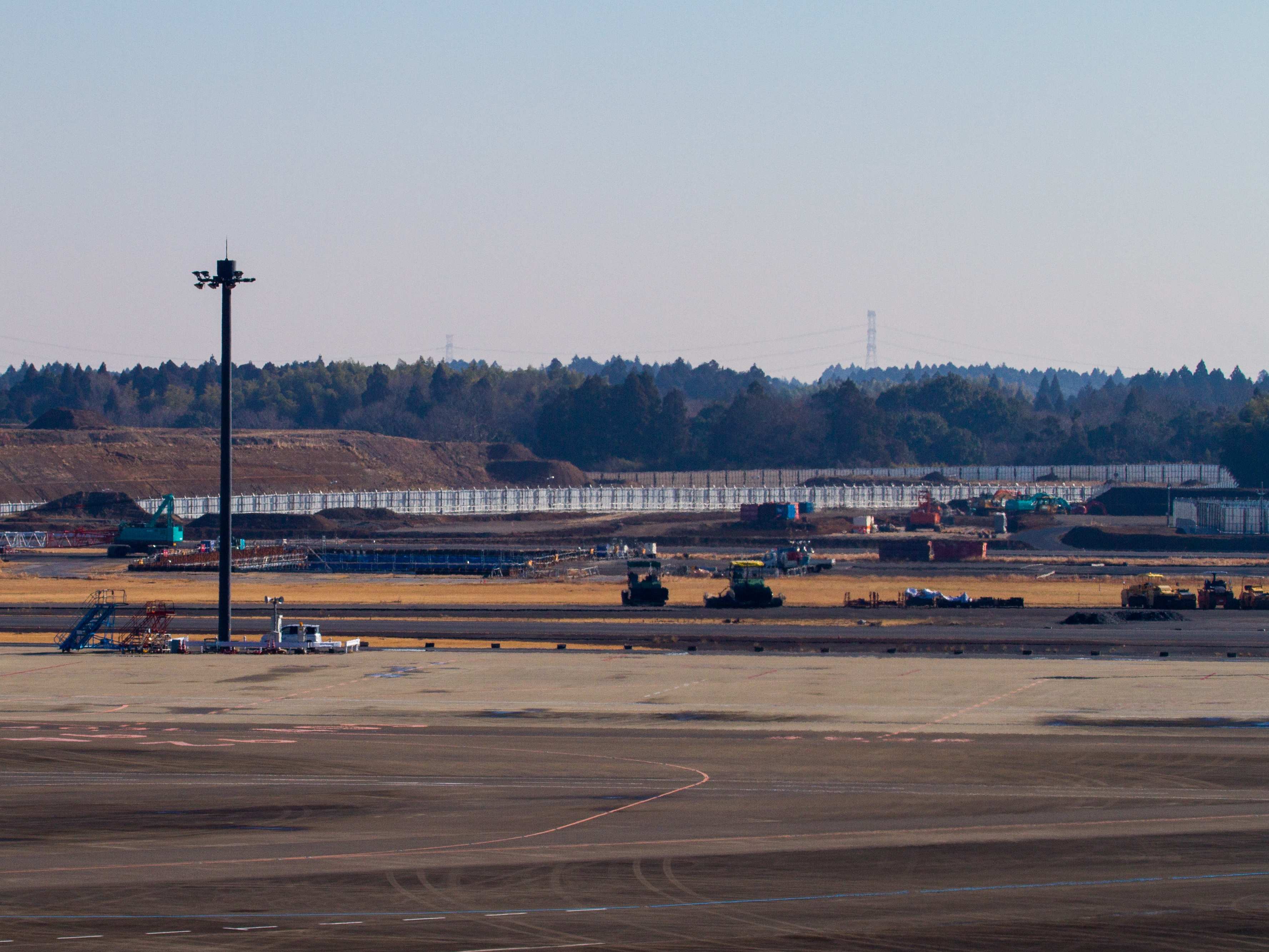 成田空港エプロン地区の拡張工事